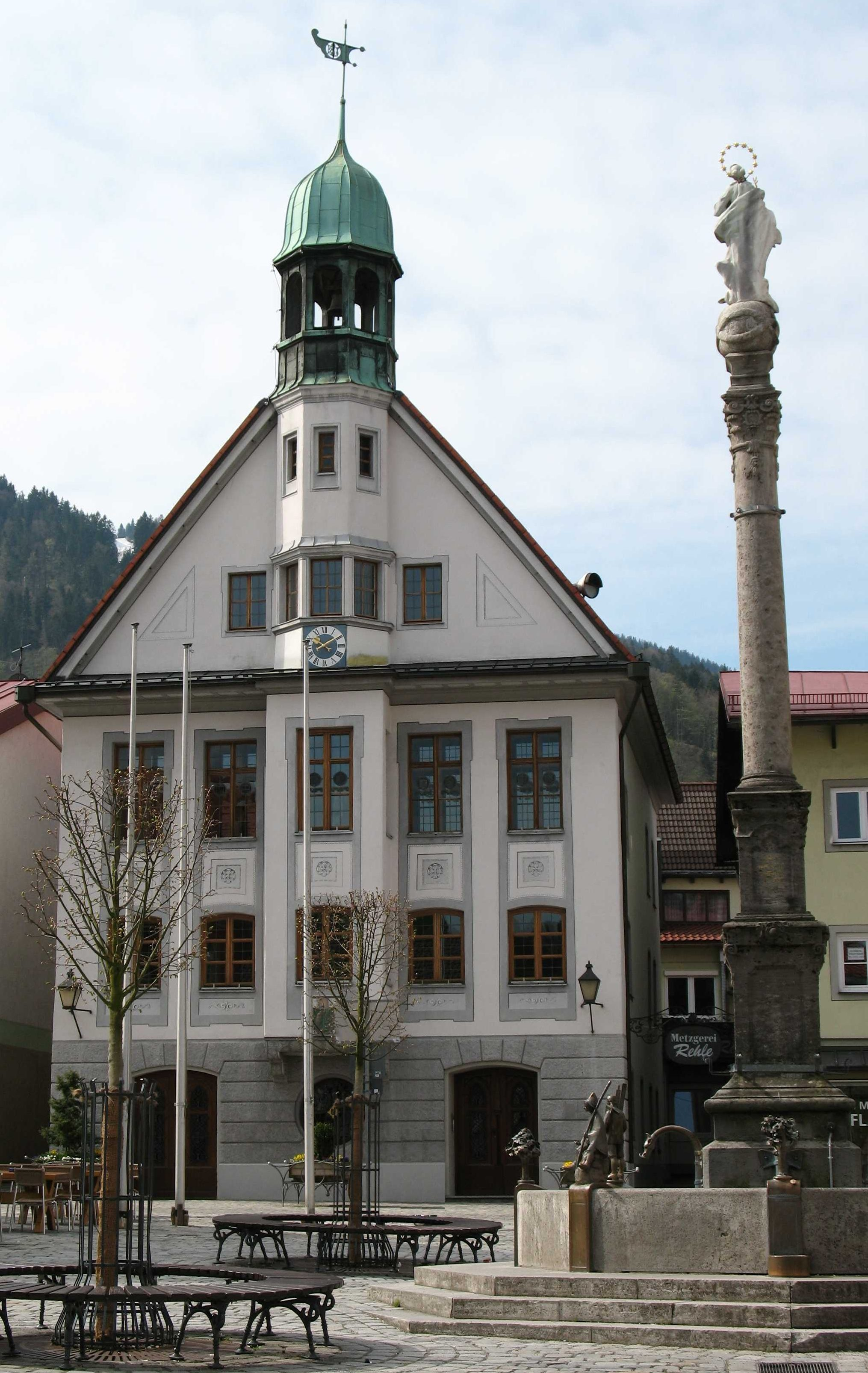 Rathaus in Immenstadt im Allgäu